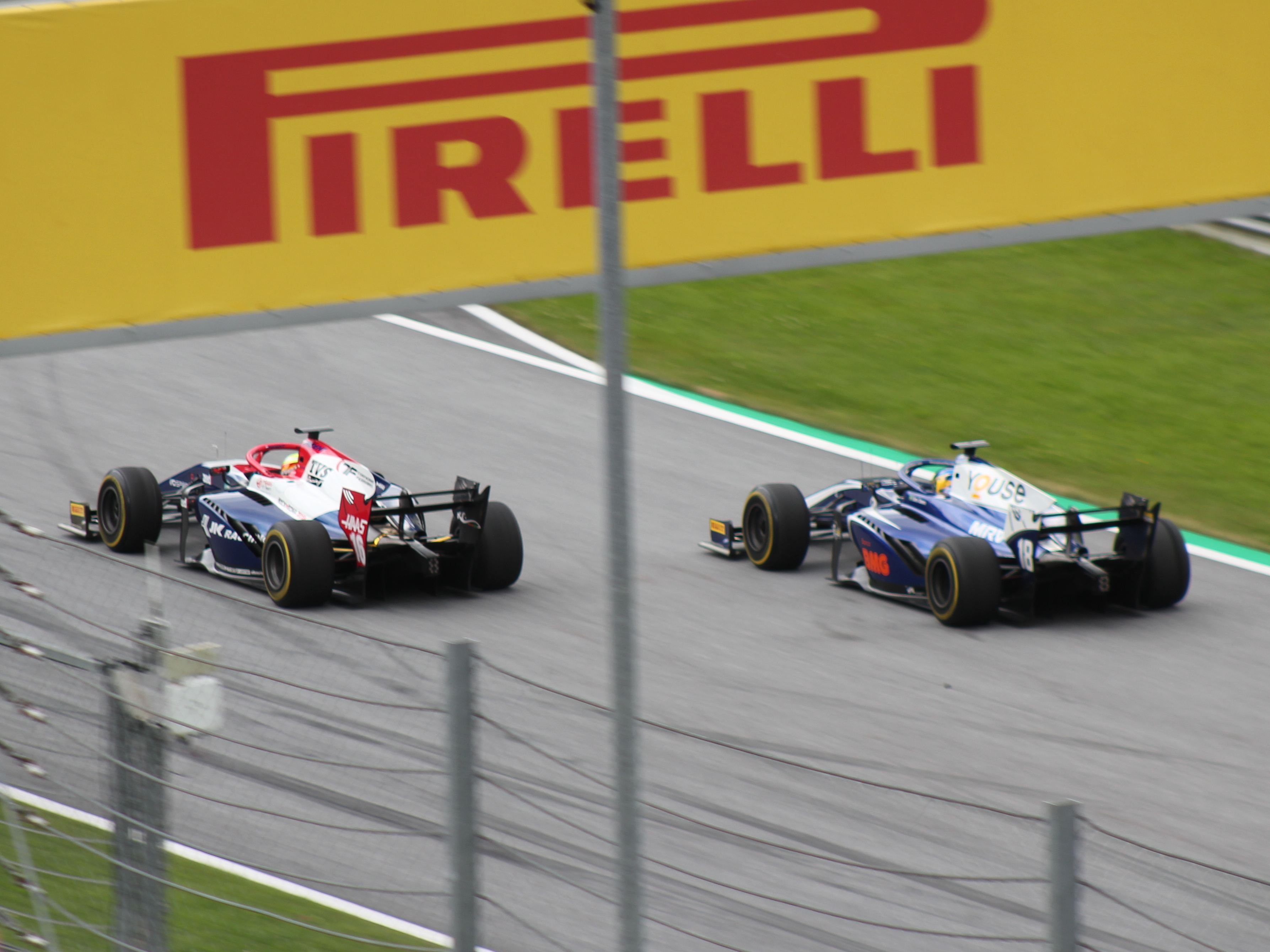 Arjun Maini überholt Sérgio Sette Câmara im Training